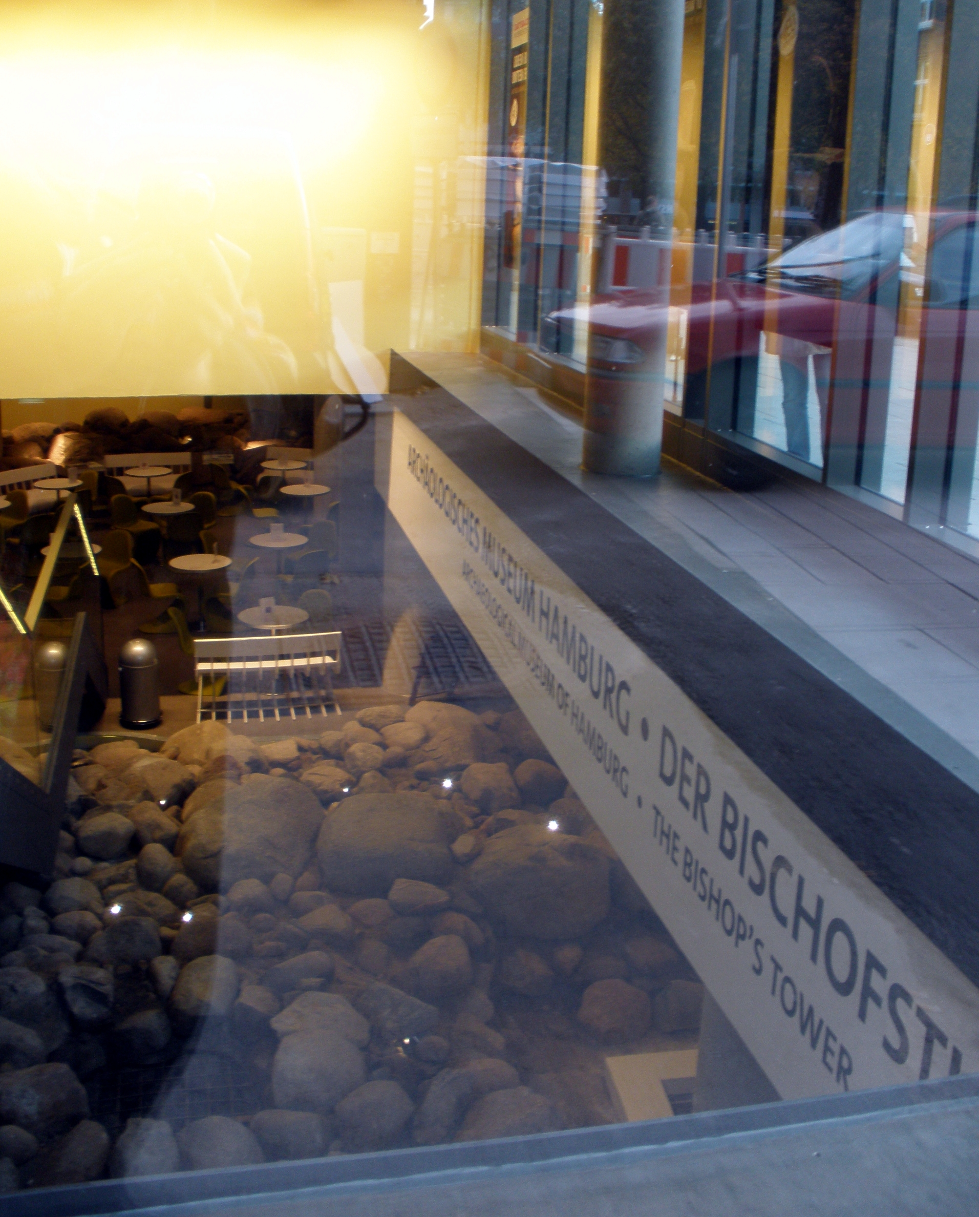 schauraum des bischofsturms in hamburg, speersortThis is a photograph of an architectural monument.